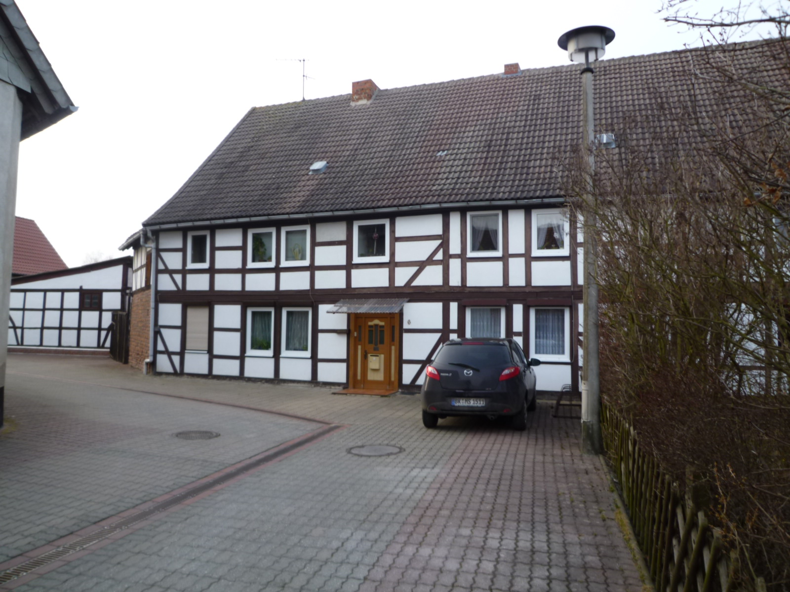 Der Ackerbürgerhof in der Halbenmondstraße 6 (Calvörde), Vorderansicht